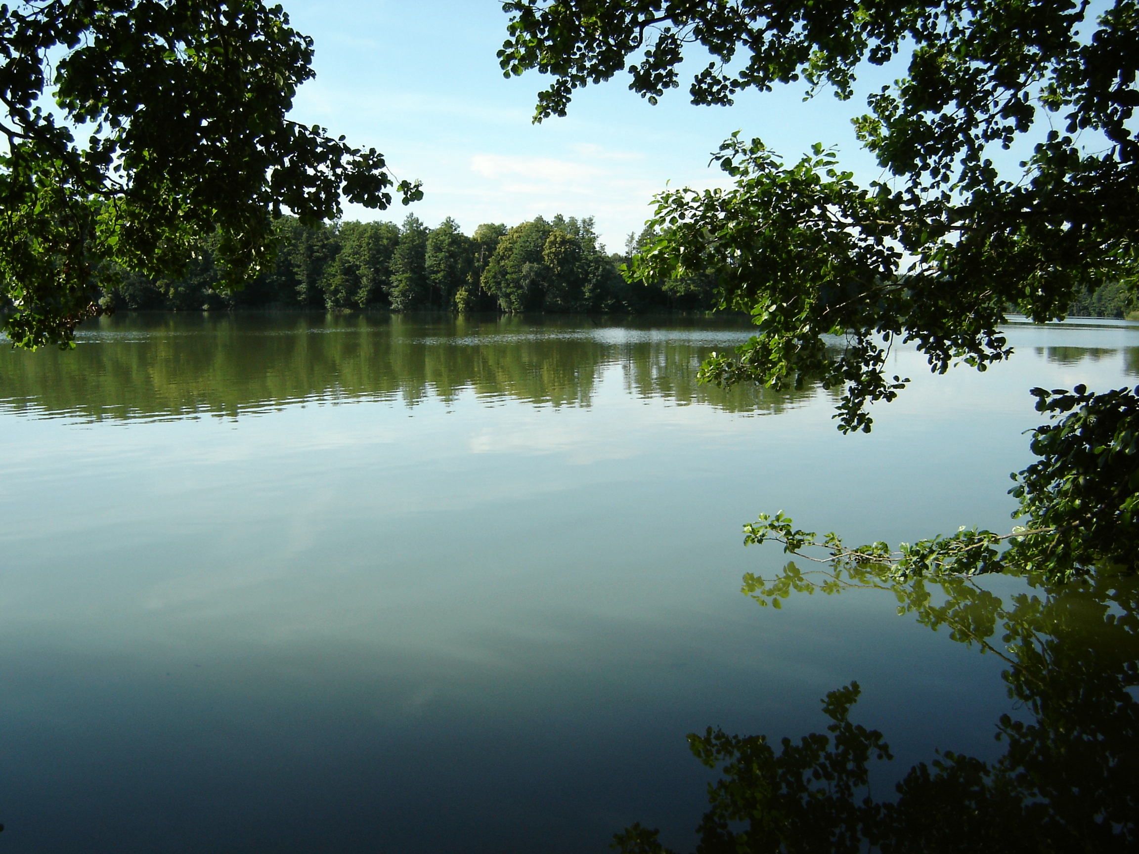 Der Maxsee im Landkreis Märkisch-Oderland (Brandenburg). Object location52° 28′ 09.94″ N, 13° 59′ 50.9″ E